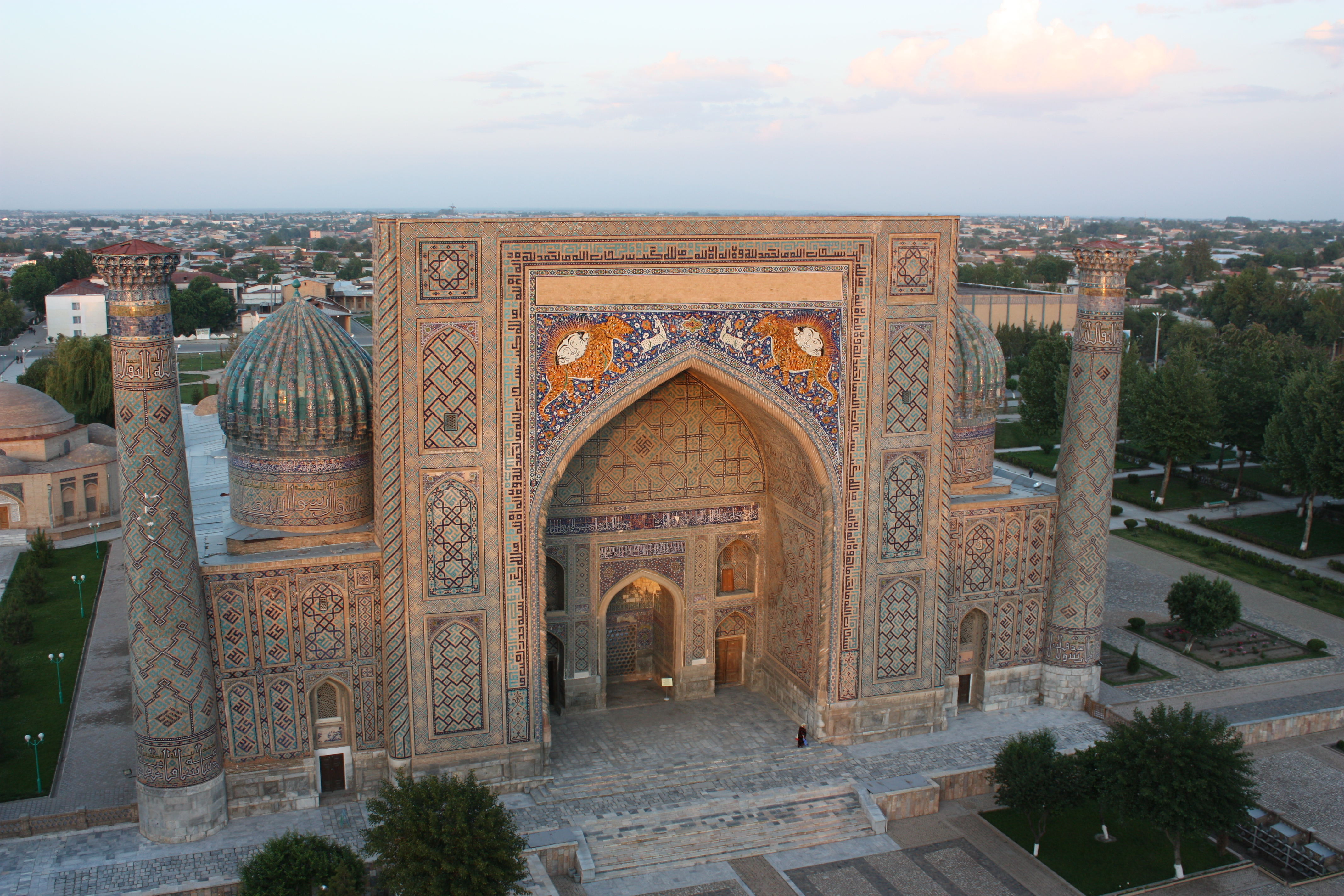 Samarkand, from Ulugbek Medressa's Minaret, Registan: Sher Dor Medressa